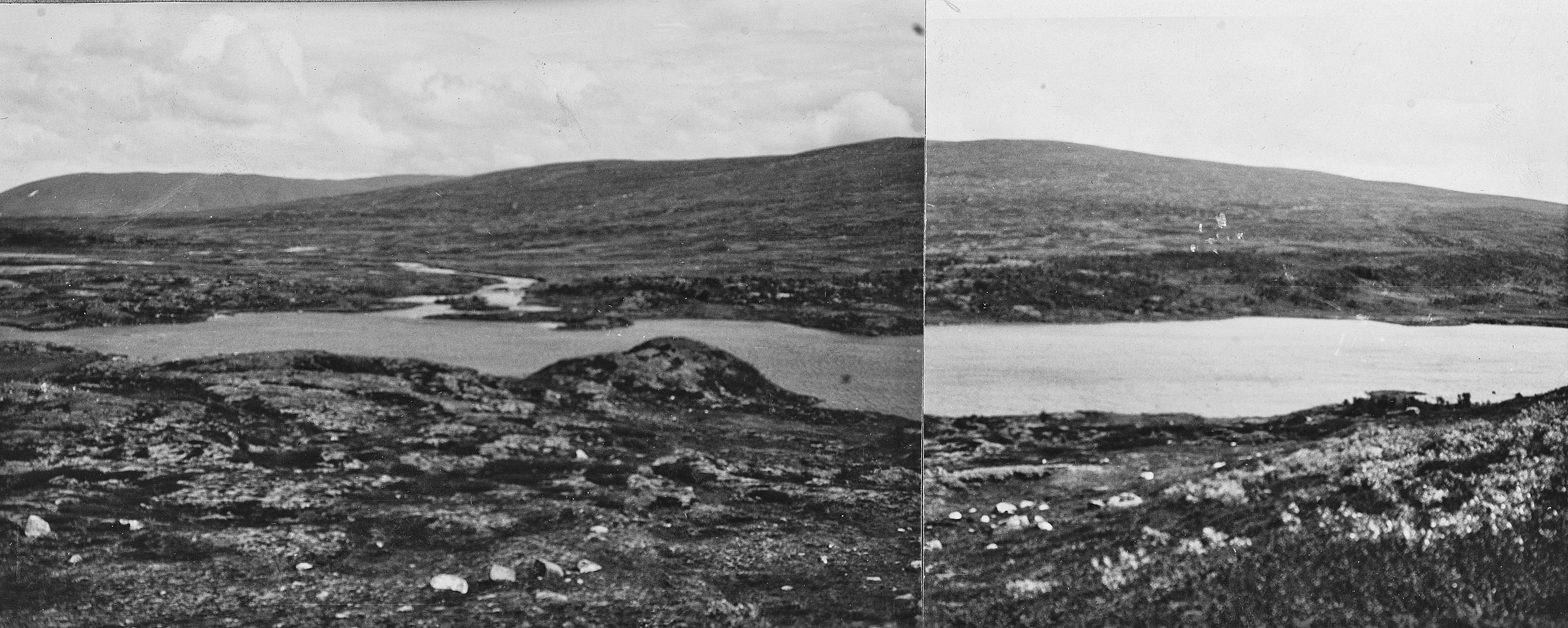 Bildet er hentet fra Arkivverket. Fjellandskap fotografert i forbindelse med en av Høyfjellskommisjonens befaringer. Dalbusjøen sett fra høyden i vest. Foras (Fordas) innfallsos og utfallsos. Grensehaugen på vestsiden. Arkivinstitusjon : Riksarkivet Arkivnavn : Høyfjellskommisjonen Sted : Norge, Hedmark, Os, Emneord: Allmenningsgrunn, Fjell, Fjellandskap, Høyfjell, Høyfjellsgrunn, Særdomstol Avbildet